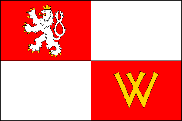 Vlajka města Nové Strašecí